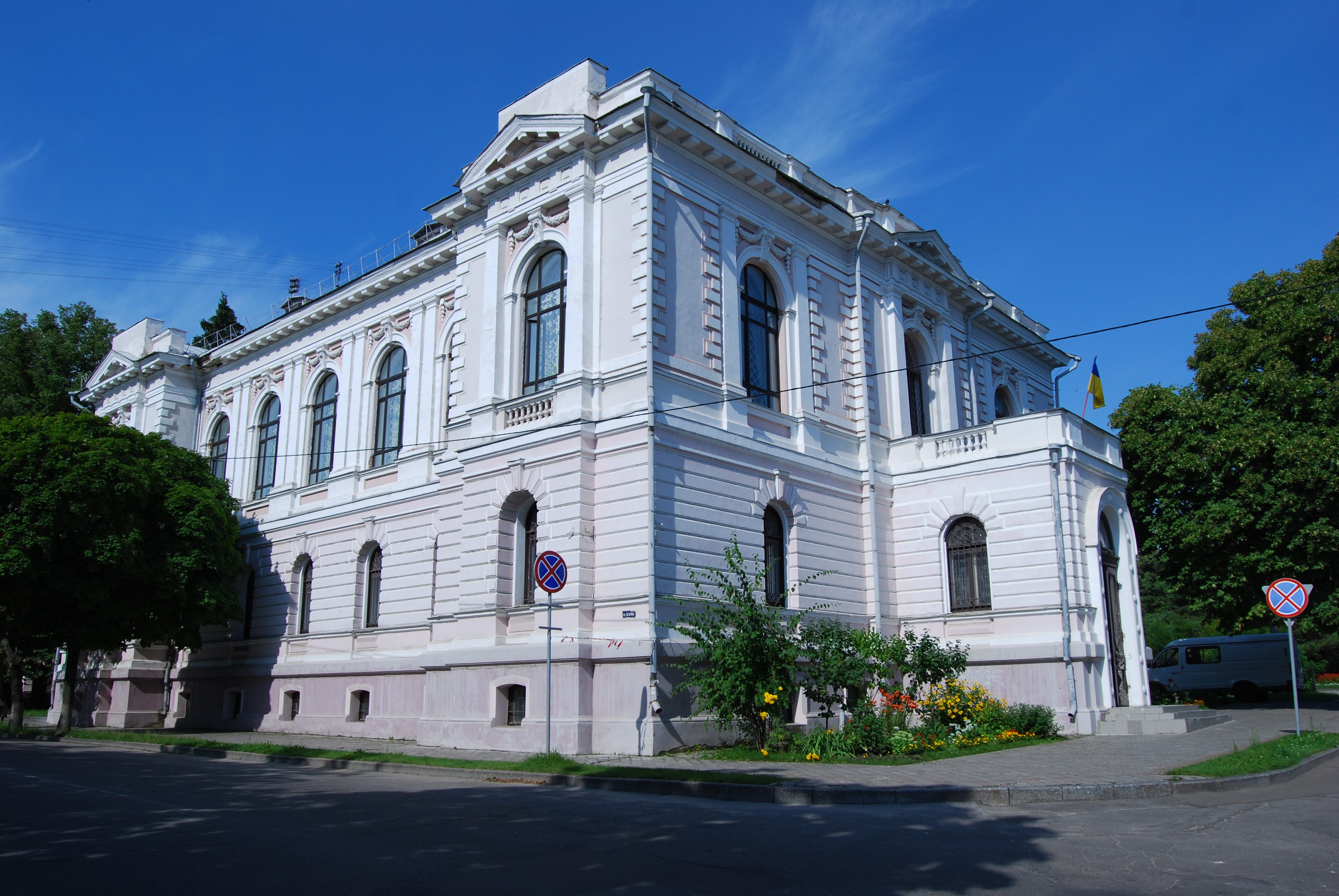 Сумський обласний художній музей ім. Никанора Онацького